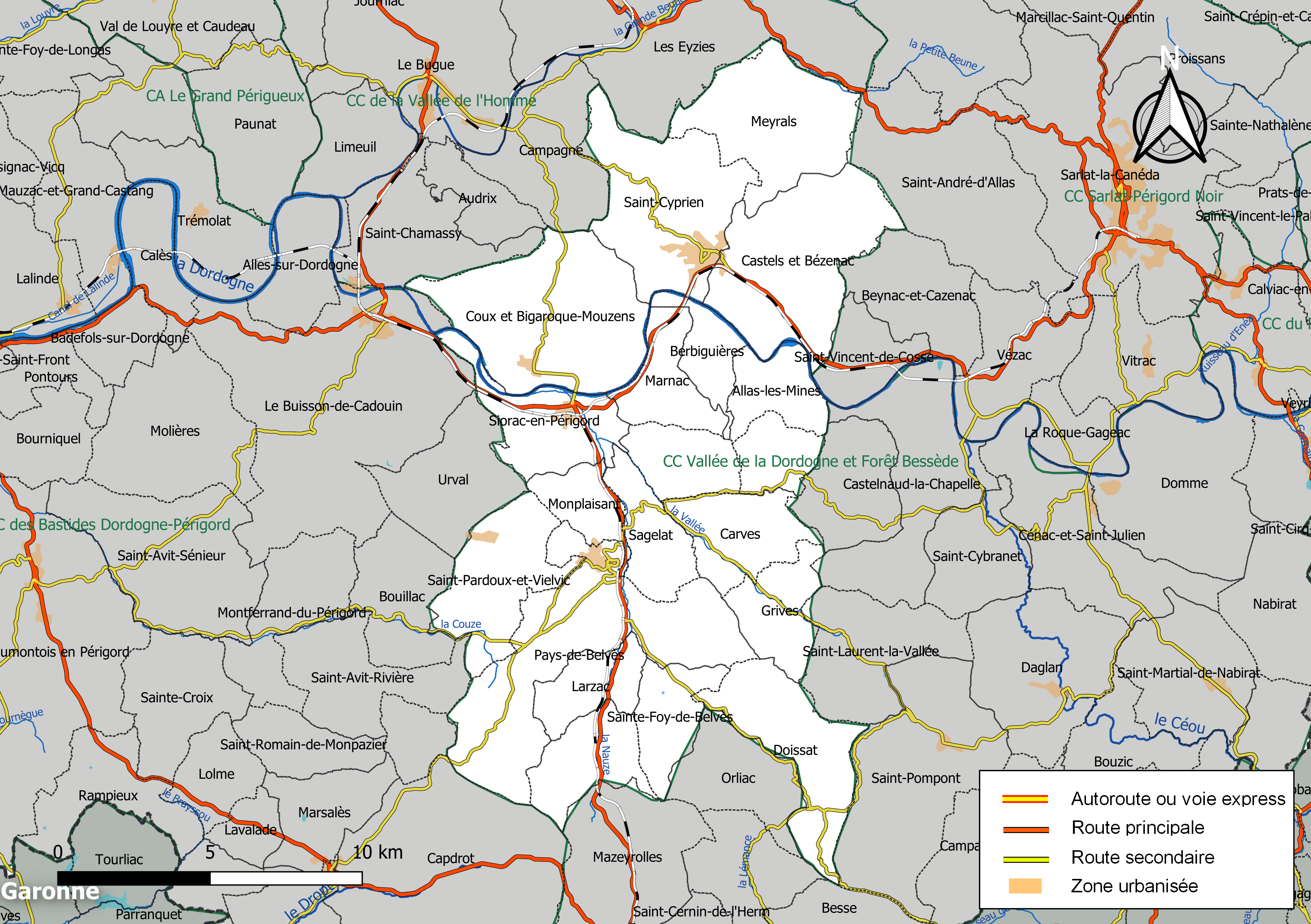 Carte géographique de la Communauté de communes Vallée de la Dordogne et Forêt Bessède, département de la Dordogne, France. Composition au 1er janvier 2019.